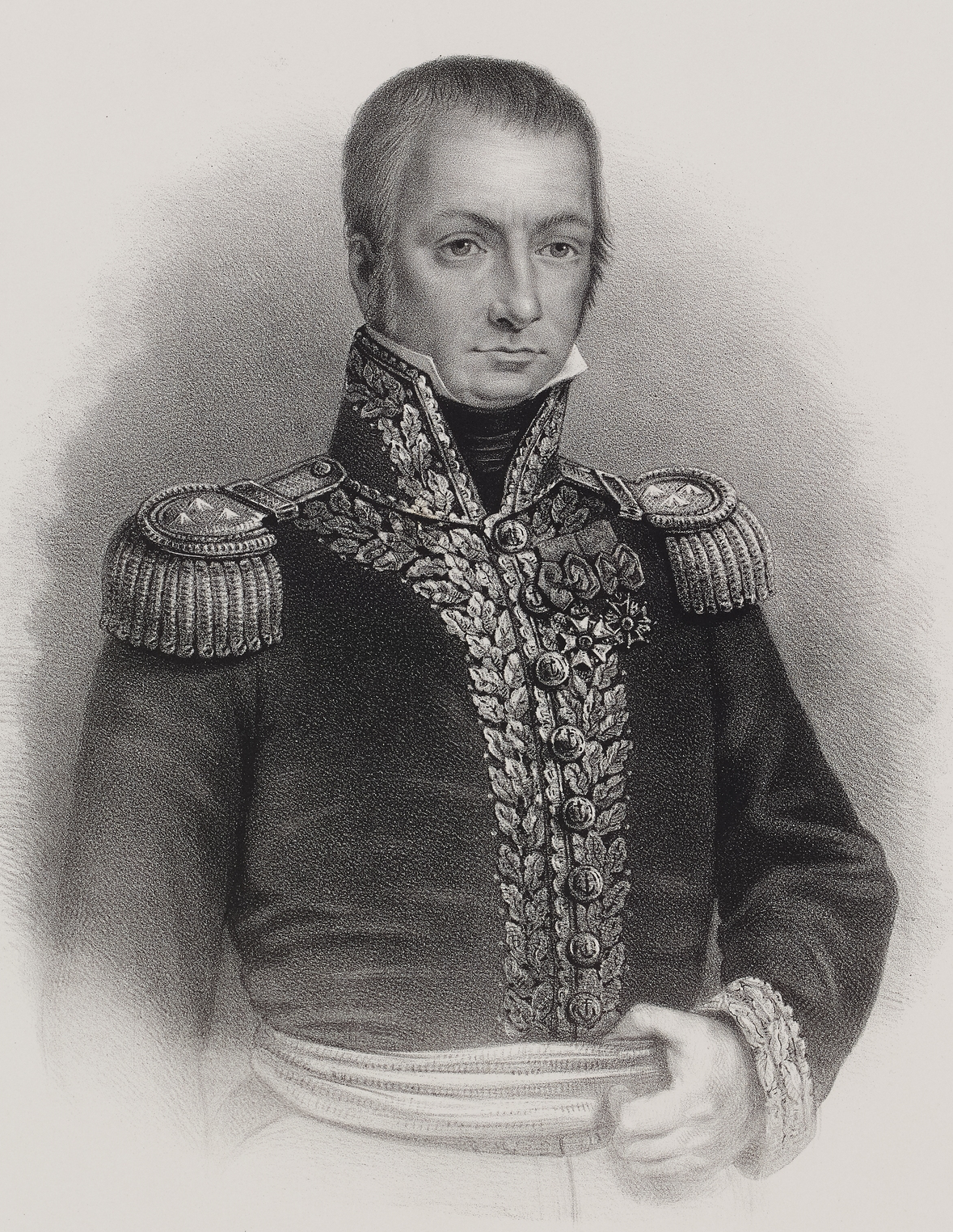 Capitaine Amable Troude